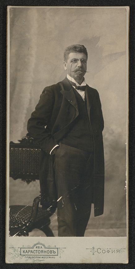 Христо Станишев